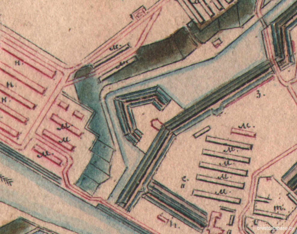 План крэпасці Брэст-Літоўск, Брэсцкі абласны краязнаўчы музей, 15241/044.